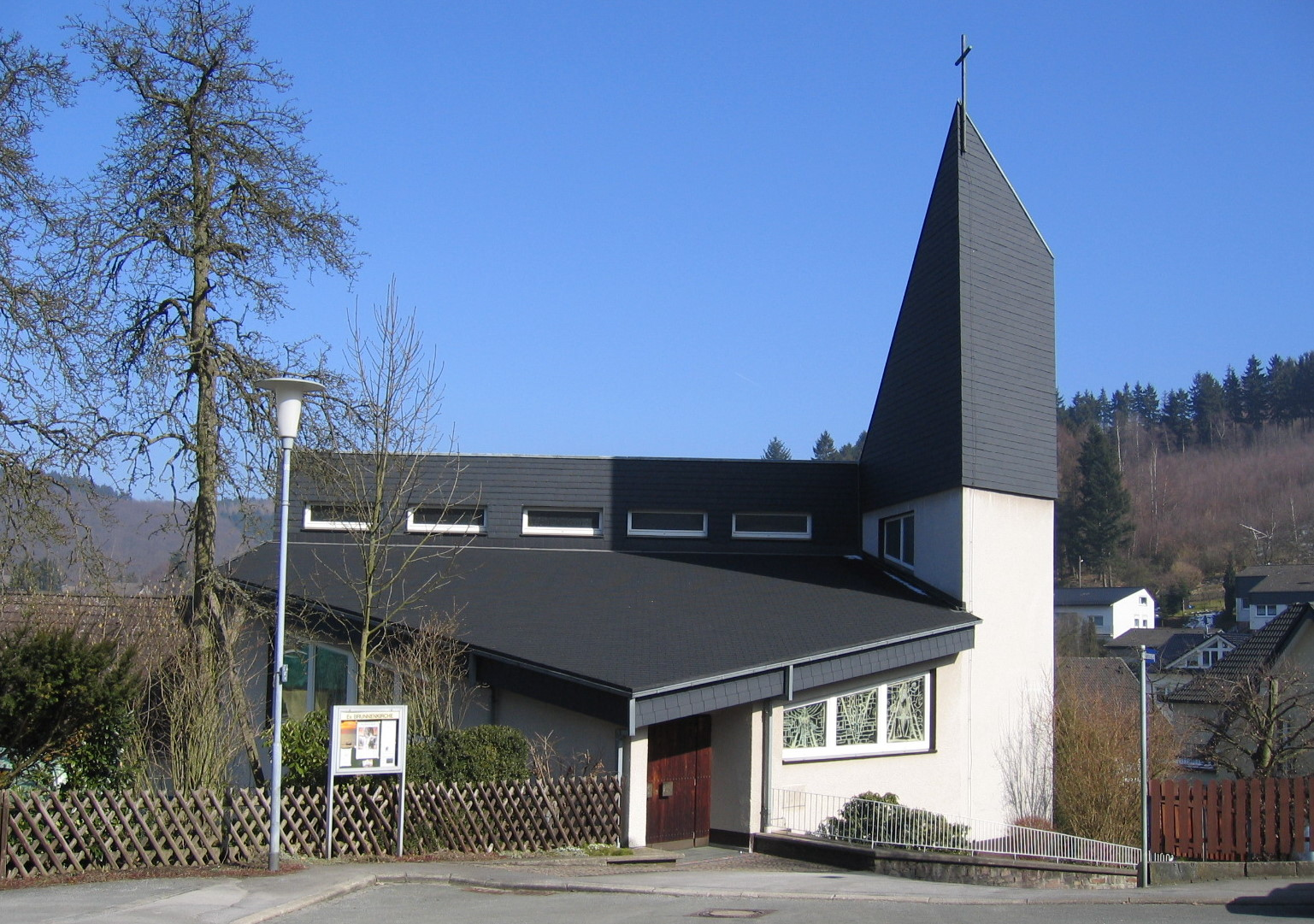 Description: Evangelische Brunnenkirche in Iserlohn-Lössel Source: selbst fotografiert Date: 19. März 2006 Author: Bubo